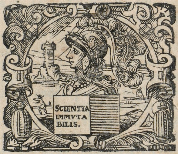 Druckerzeichen von Lazarus Zetzner, aus einem Druck der Erben von 1623 (Zentralbibliothek Zürich)